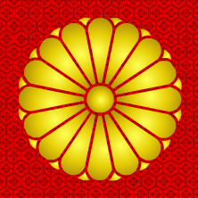 self made imperial mon-crest